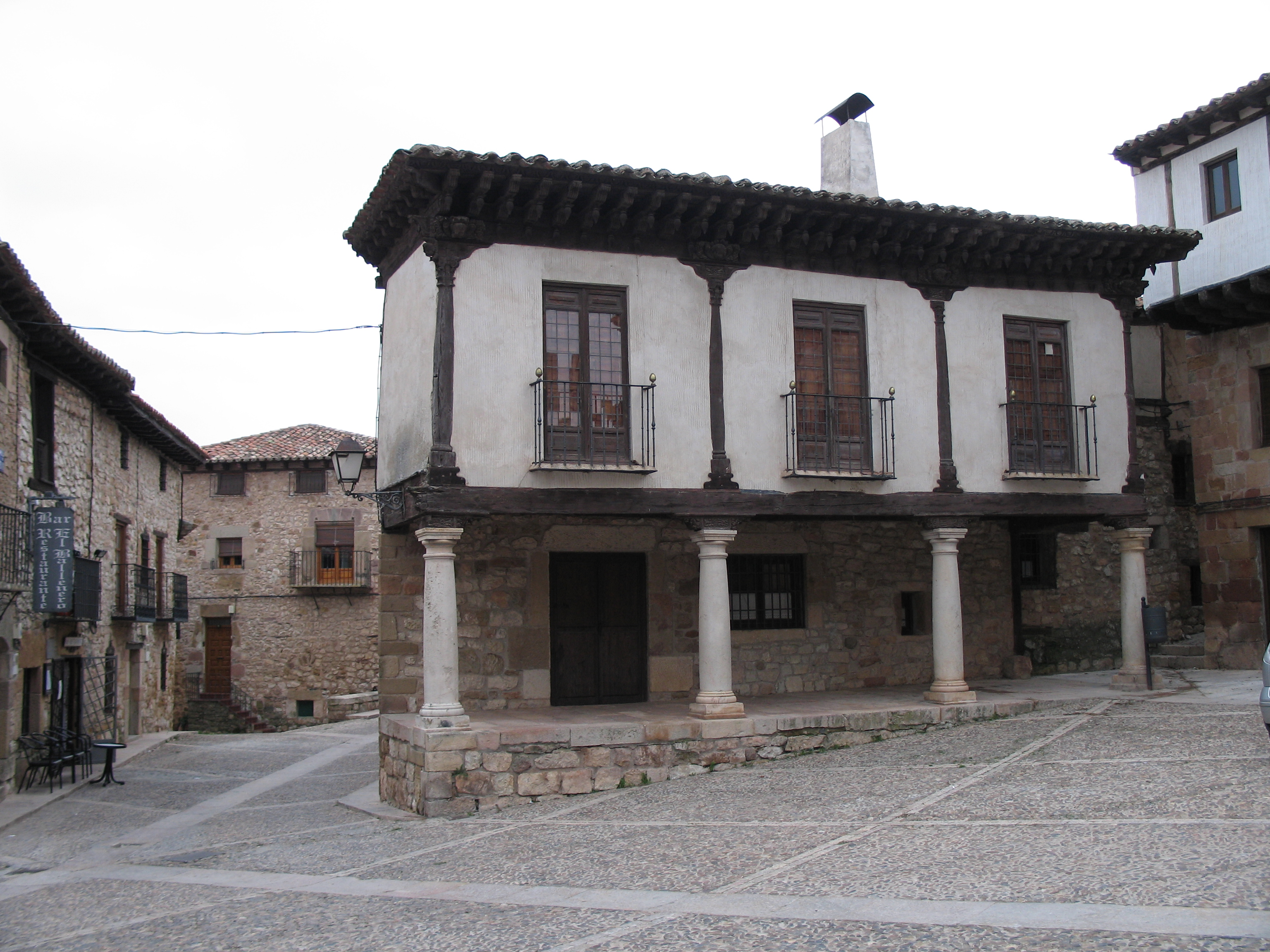 Plaza del Mercado. Atienza (Guadalajara, España)